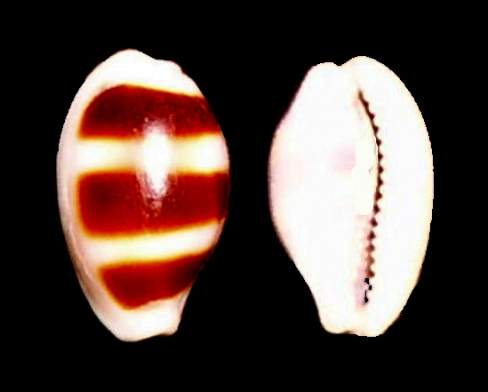 Asellus Cowry - Palmadusta asellus (synonym :Cypraea asellus)